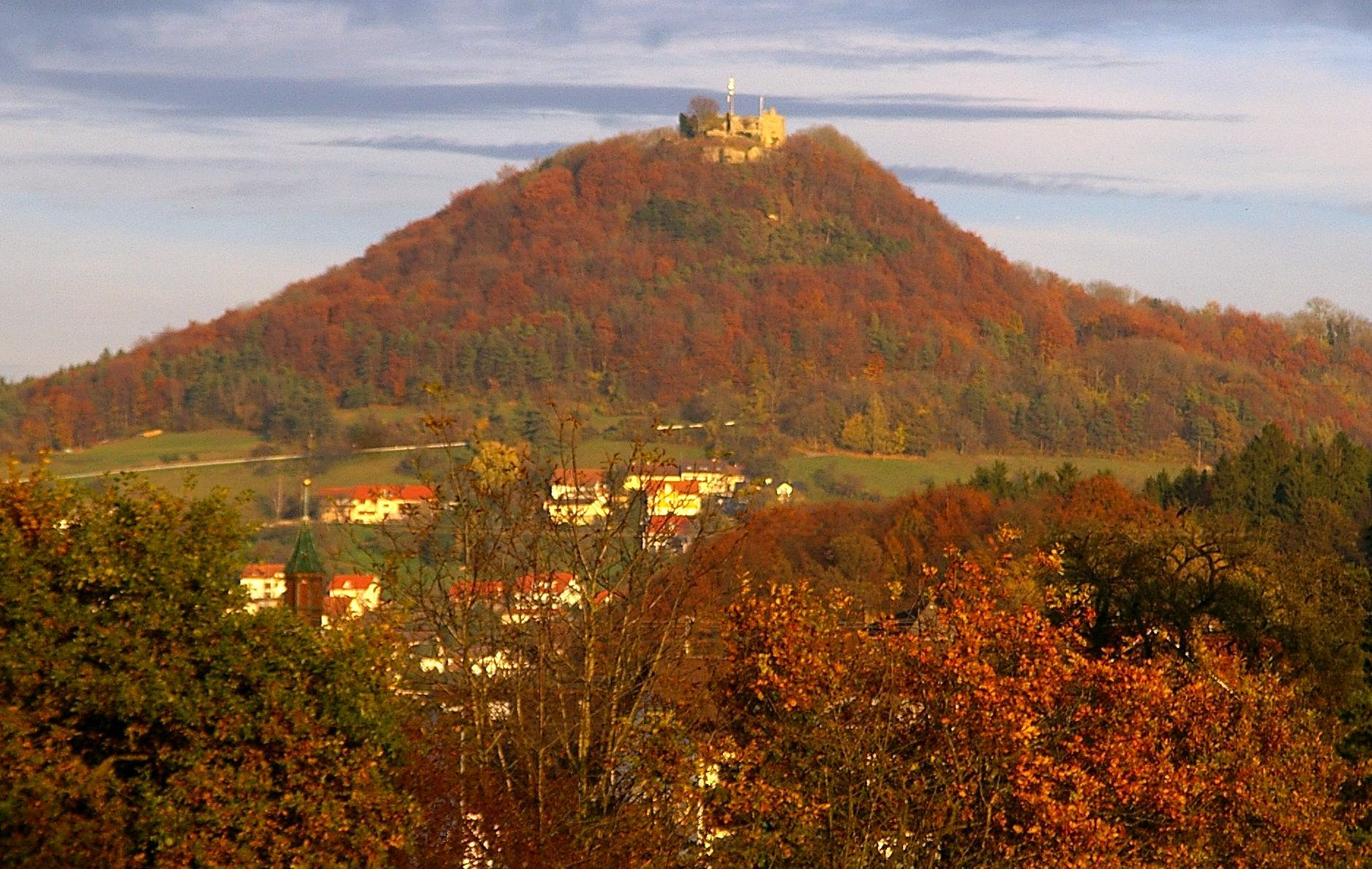 Küssaburg und Bechtersbohl